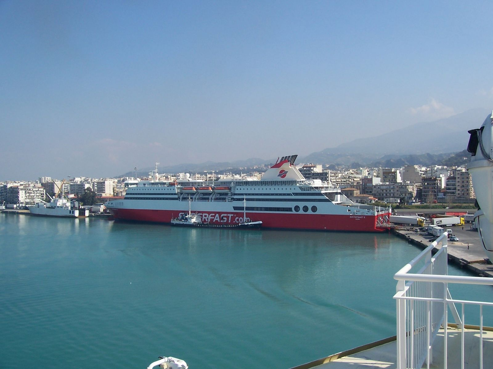 Patra, Grecia